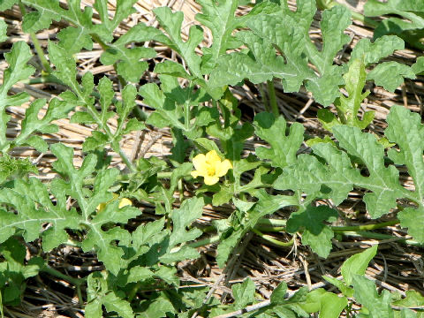 Citrullus lanatus